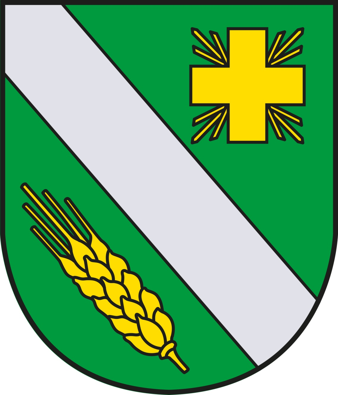 Das Kreuz im Wappen weist auf den Namen (Patrozinium), die Ähre auf die (seinerzeitige) landwirtschaftliche Struktur der Gemeinde hin.